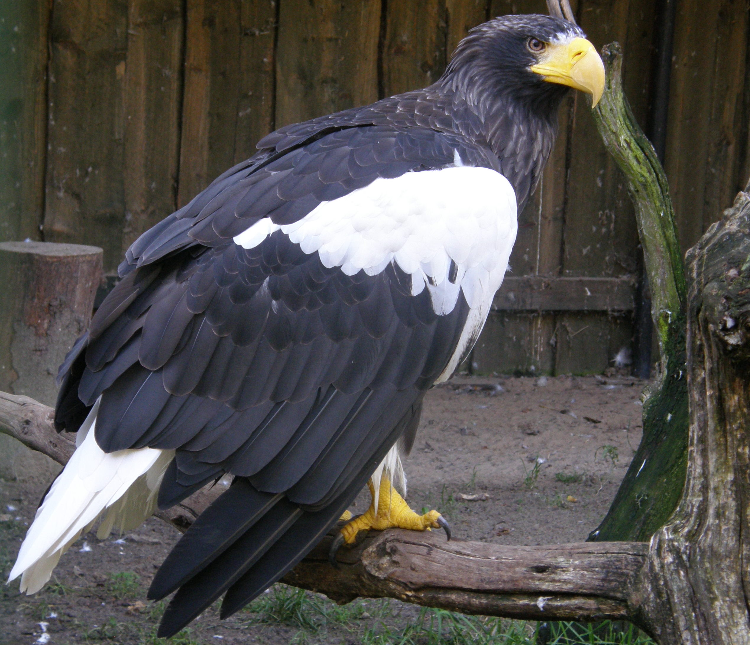 Hiid-merikotkas Tallinna loomaaias.